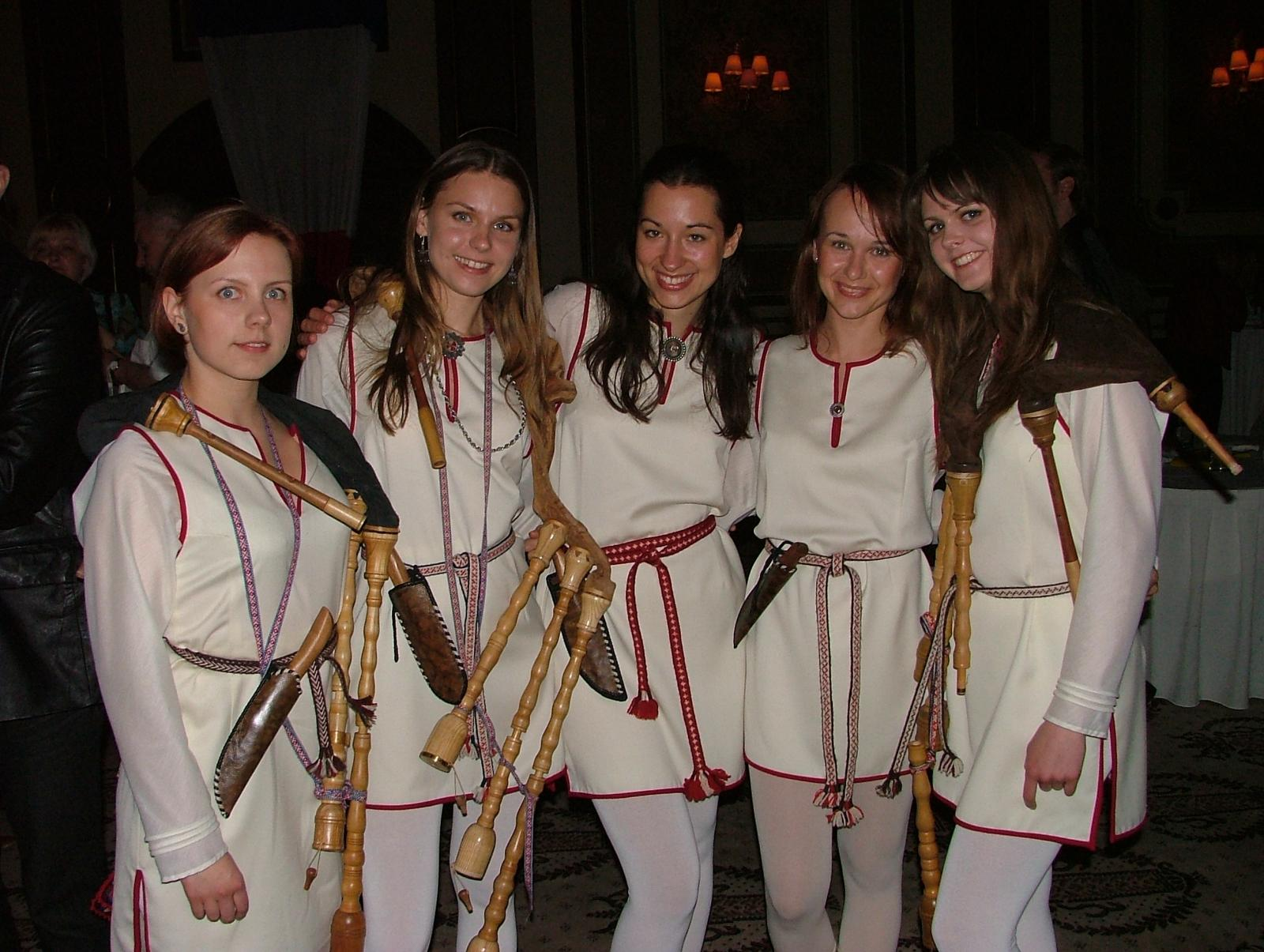 Neiokõsõ